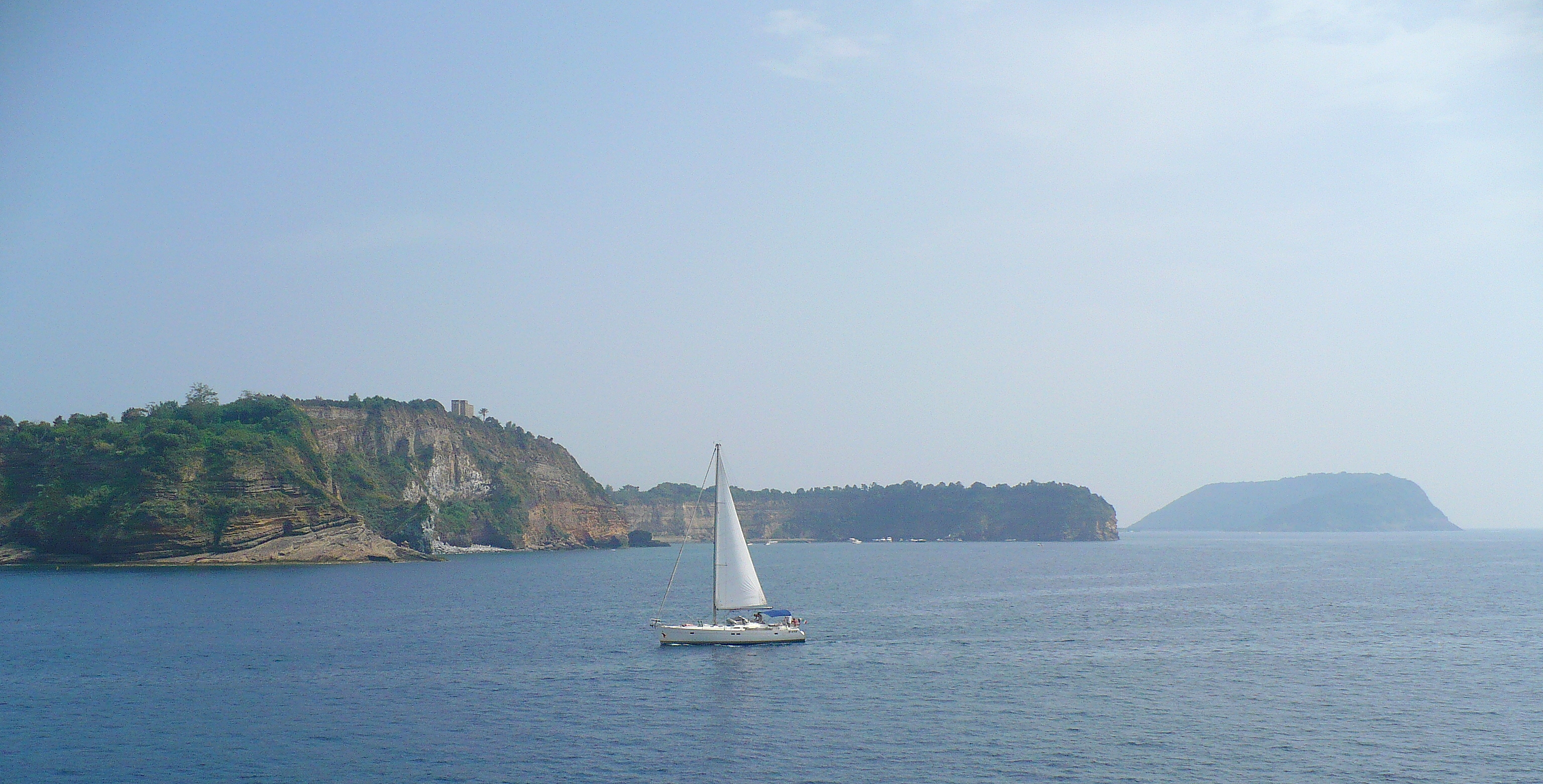 vela di fronte la costa di Procida